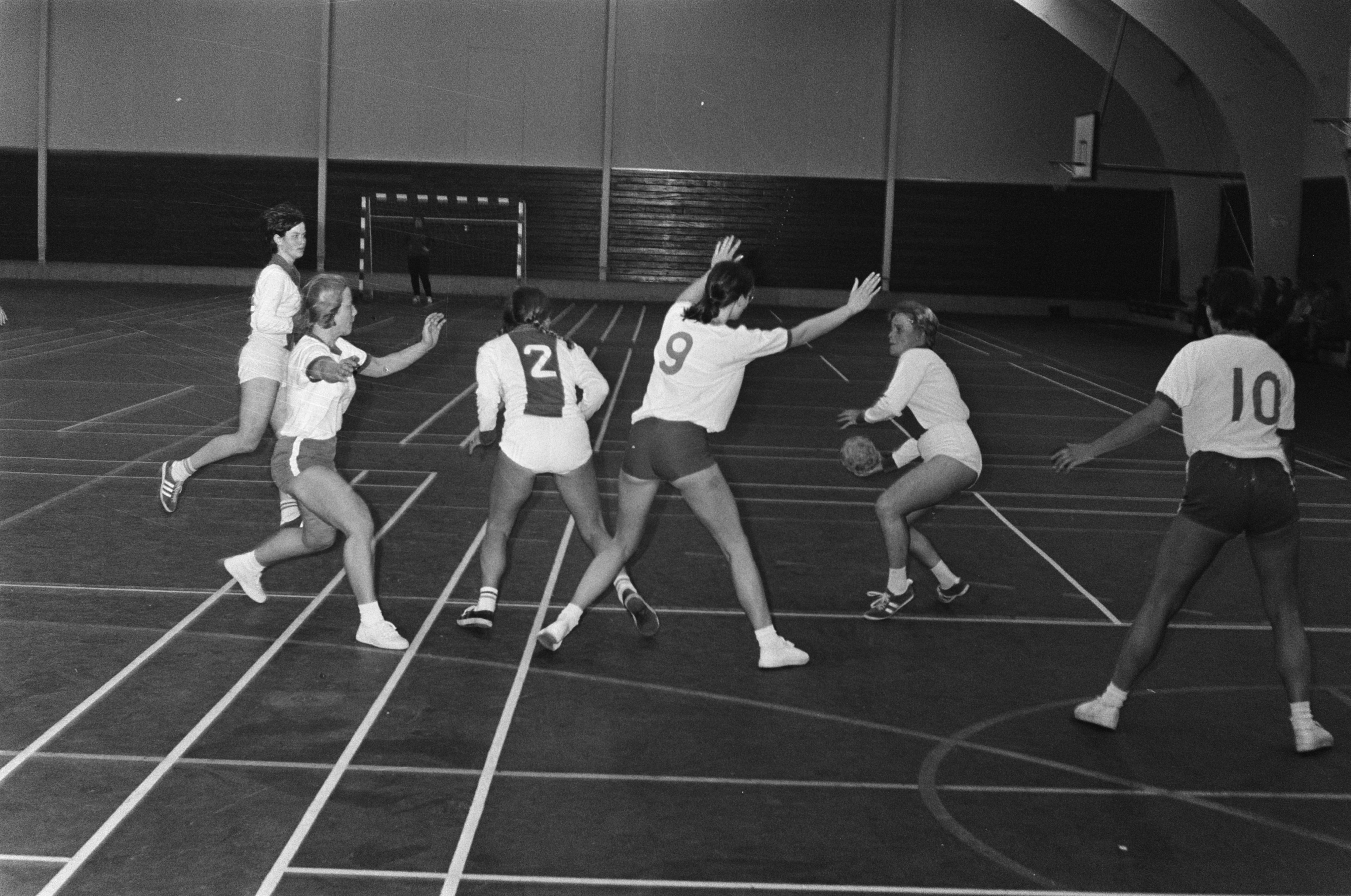 Collectie / Archief : Fotocollectie Anefo Reportage / Serie : [ onbekend ] Beschrijving : Handbal Zeeburg tegen Quintus 6-6 Dames in Jan van Galen hal Amsterdam. Zeeburg in aktie Datum : 4 januari 1970 Locatie : Amsterdam, Noord-Holland Trefwoorden : HANDBAL Persoonsnaam : QUINTUS, ZEEBURG Fotograaf : Verhoeff, Bert / Anefo Auteursrechthebbende : Nationaal Archief Materiaalsoort : Negatief (zwart/wit) Nummer archiefinventaris : bekijk toegang 2.24.01.05 Bestanddeelnummer : 923-1236